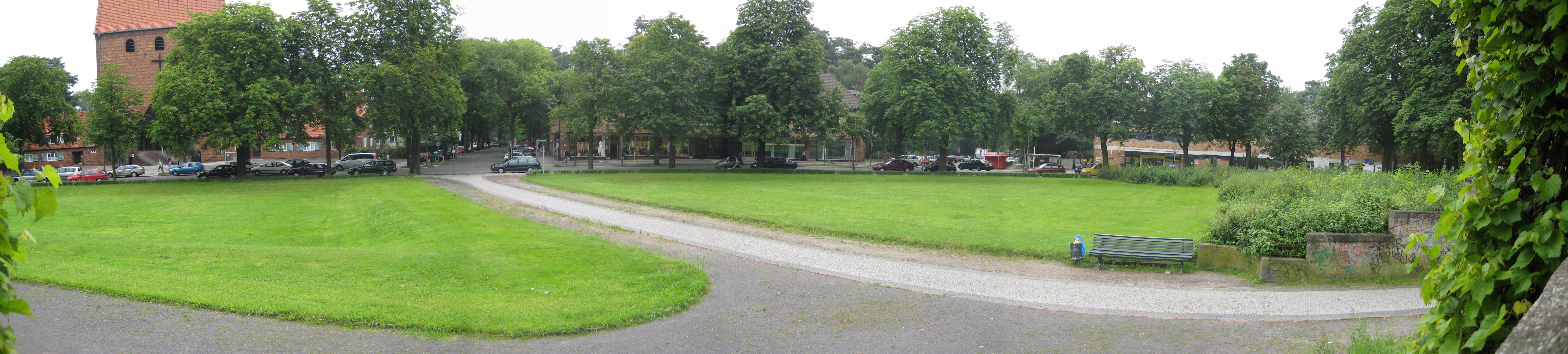 Blick auf den Zeltinger Platz in Berlin-Frohnau